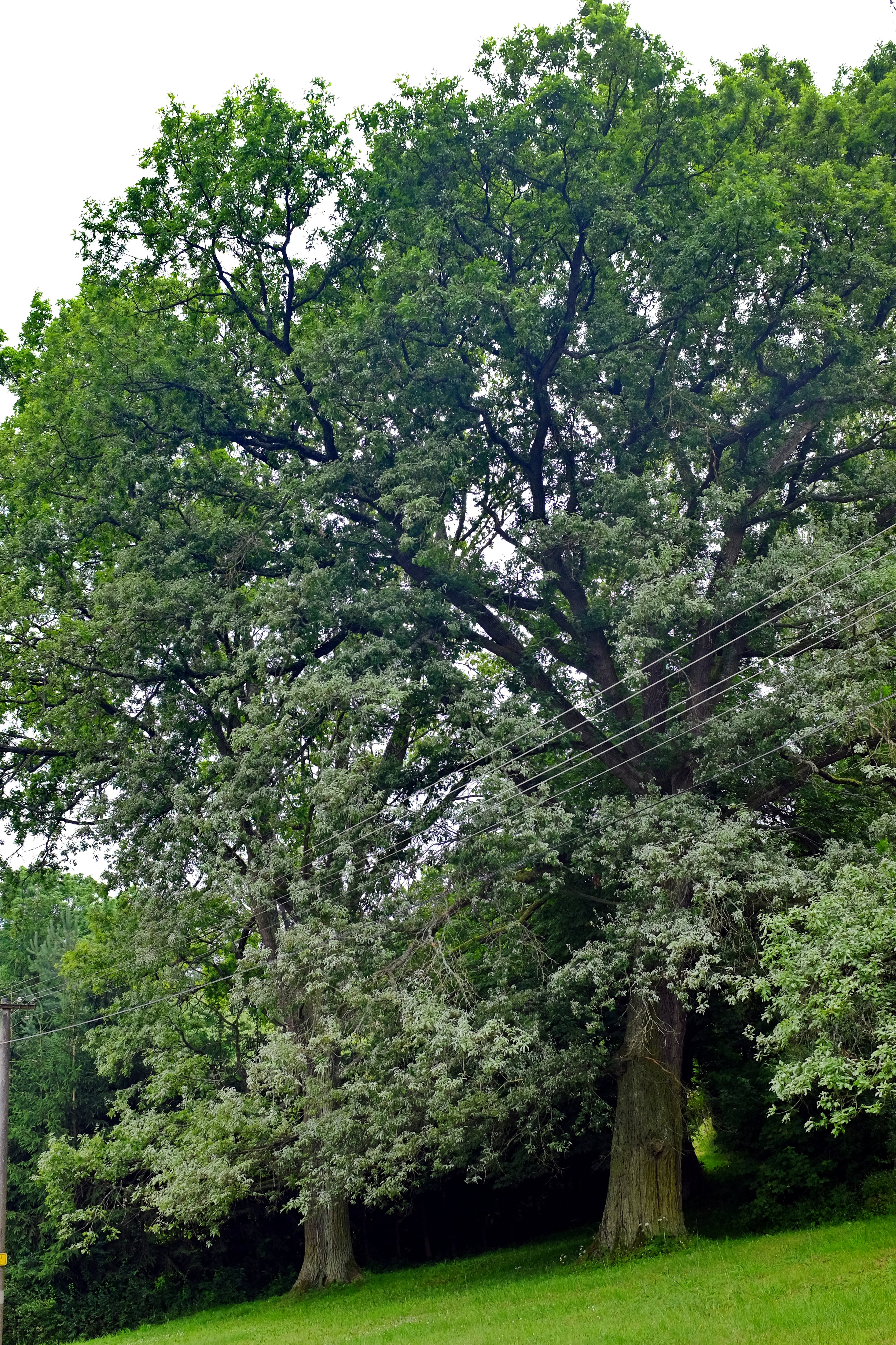 Památné stromy - Svinovské duby - Svinov, okres Karlovy Vary